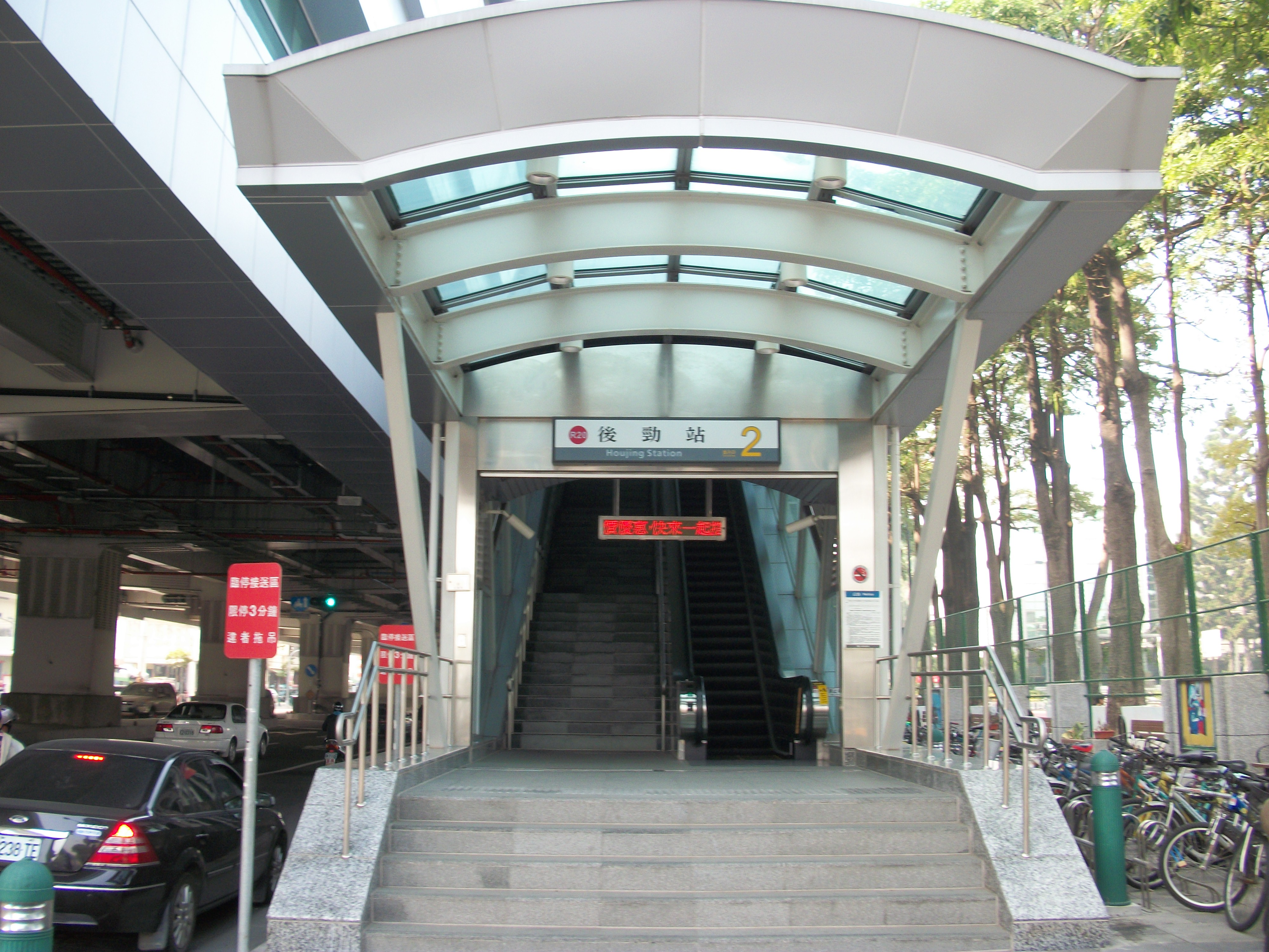 高雄捷運紅線後勁站二號出口。